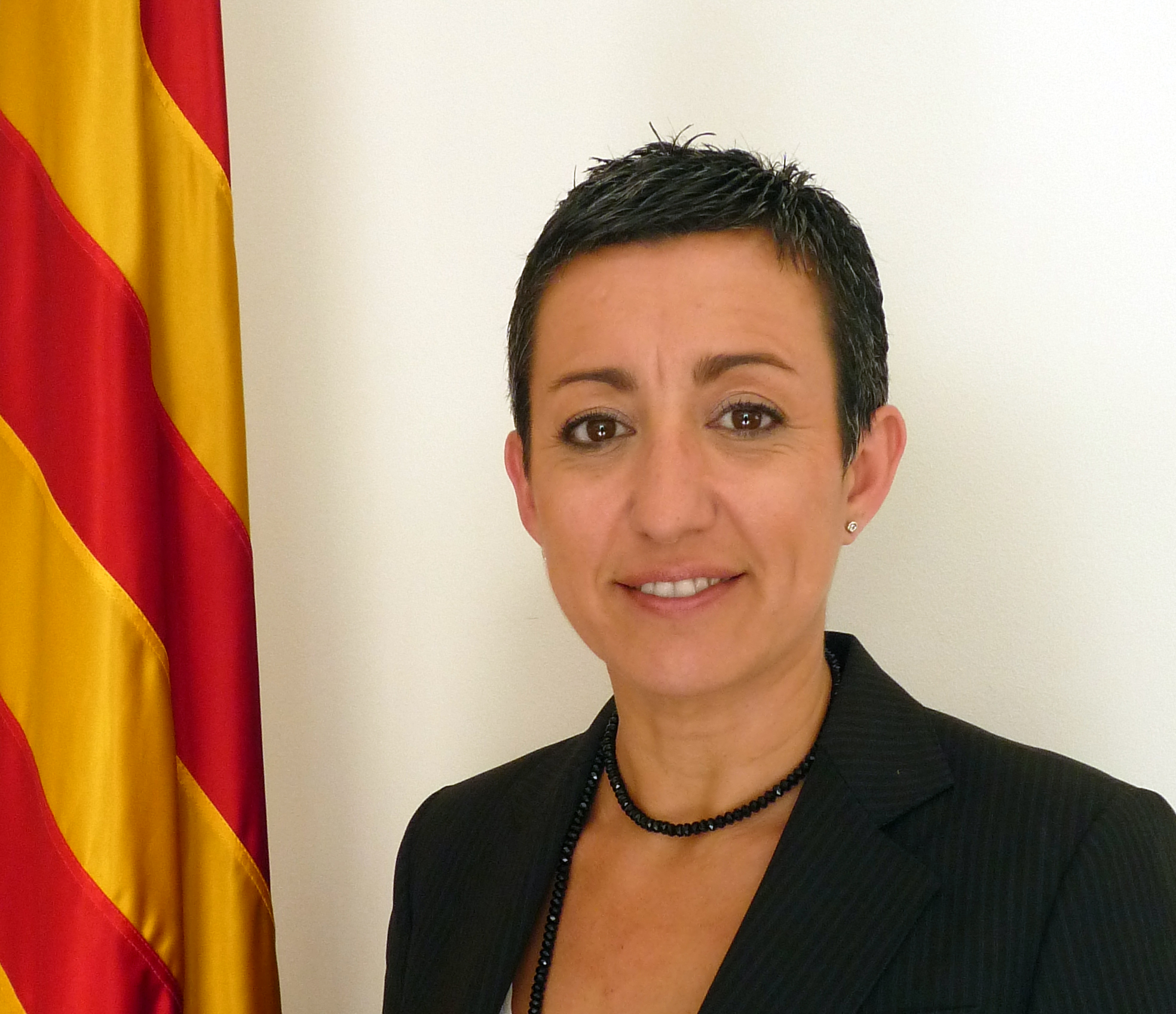 Montse Gatell, presidenta de l'Institut Català de les Dones